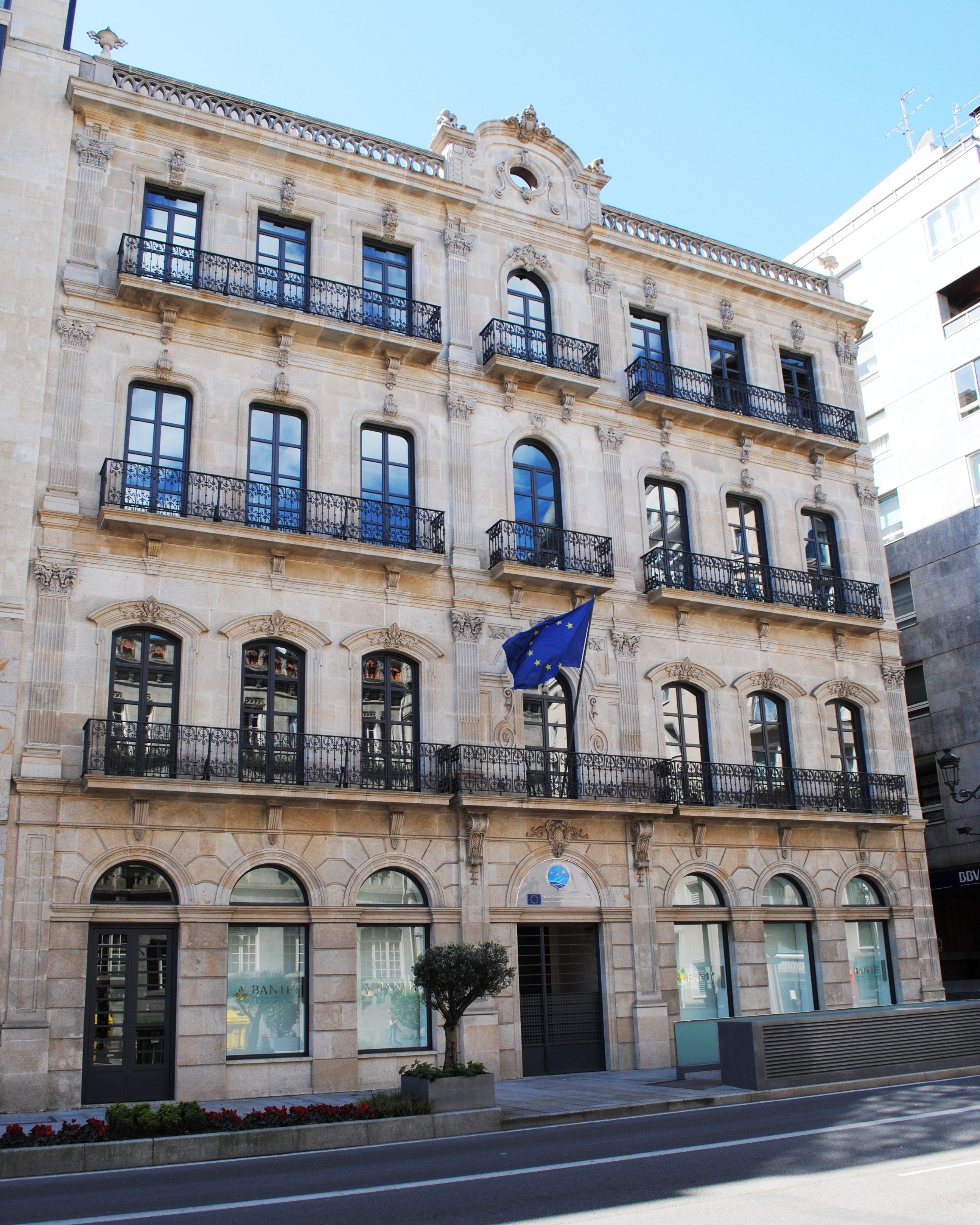 Casa Odriozola (Axencia Comunitaria de Control da Pesca), 1875, Vigo.